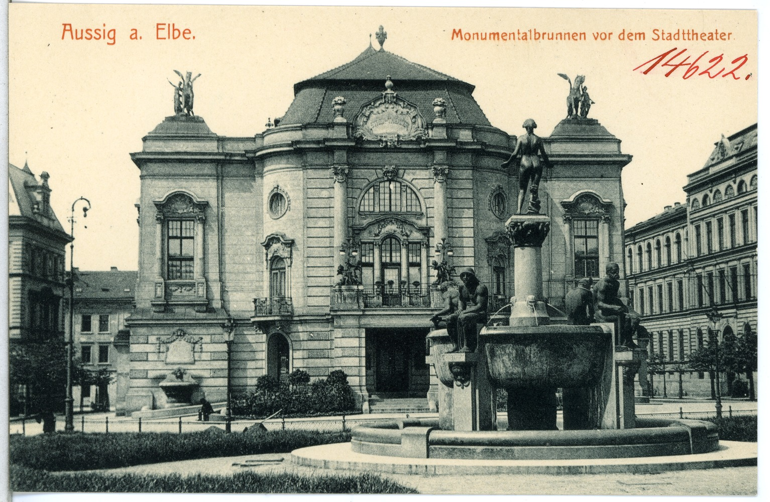 Aussig; Monumentalbrunnen vor dem Stadttheater This postcard is from publisher Brück & Sohn in Meißen ( This postcard has a unique number 14622 and is available in a higher resolution at the publisher. This images was uploaded in a cooperation project between Wikipedians and the publisher.